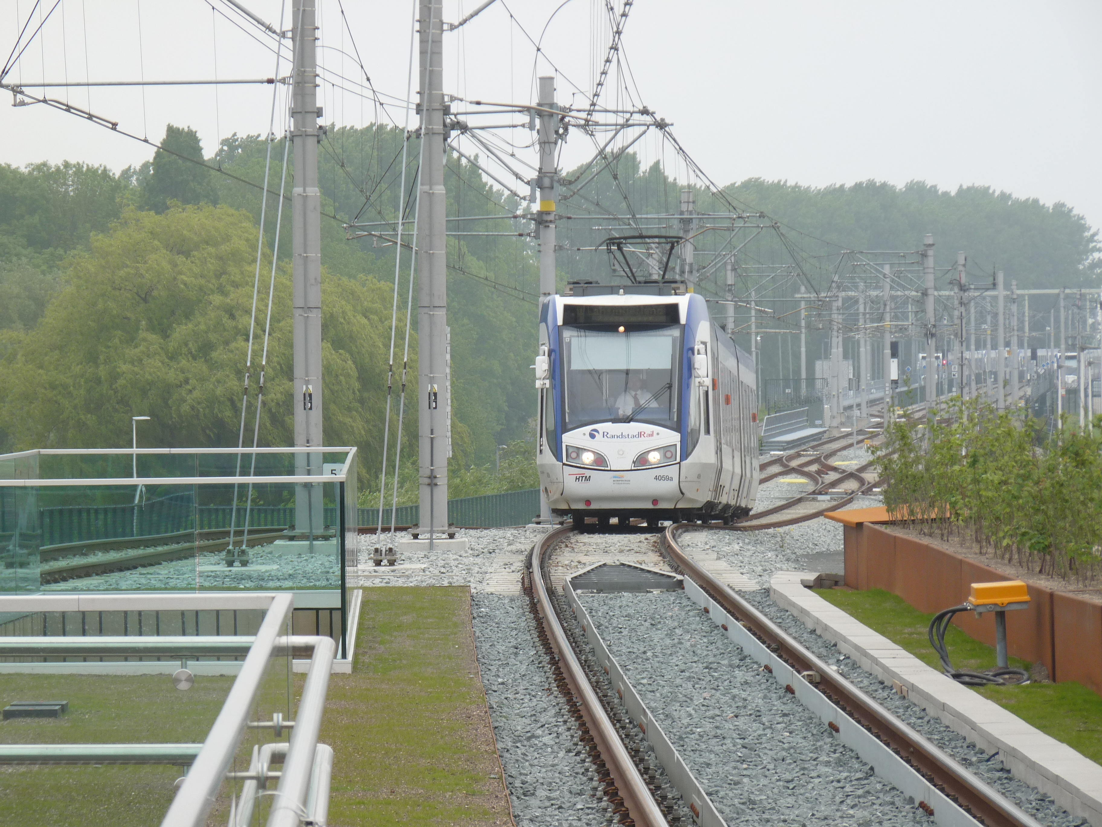 Het nieuwe randstadrail/treinstation Lansingerland-Zoetermeer op de eerste Randstadrail exploitatiedag 19 mei 2019